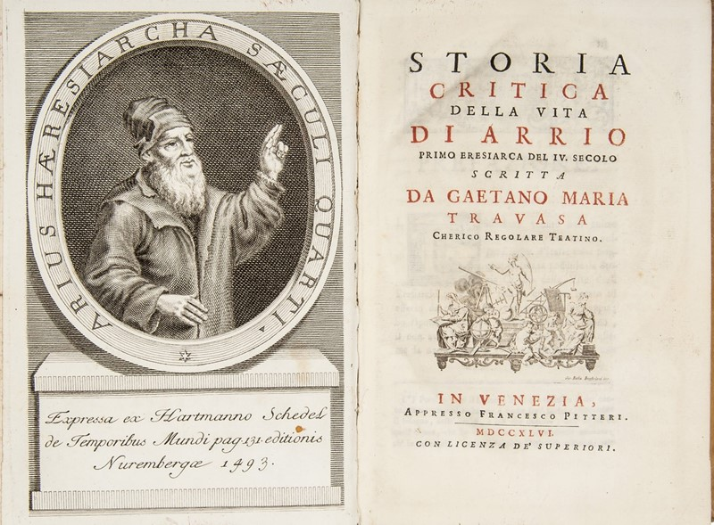 Publicación de la teoría de Arriano, donde sutentaba que Jesús no era divino, sino creado de la nada por el Poder de Dios.